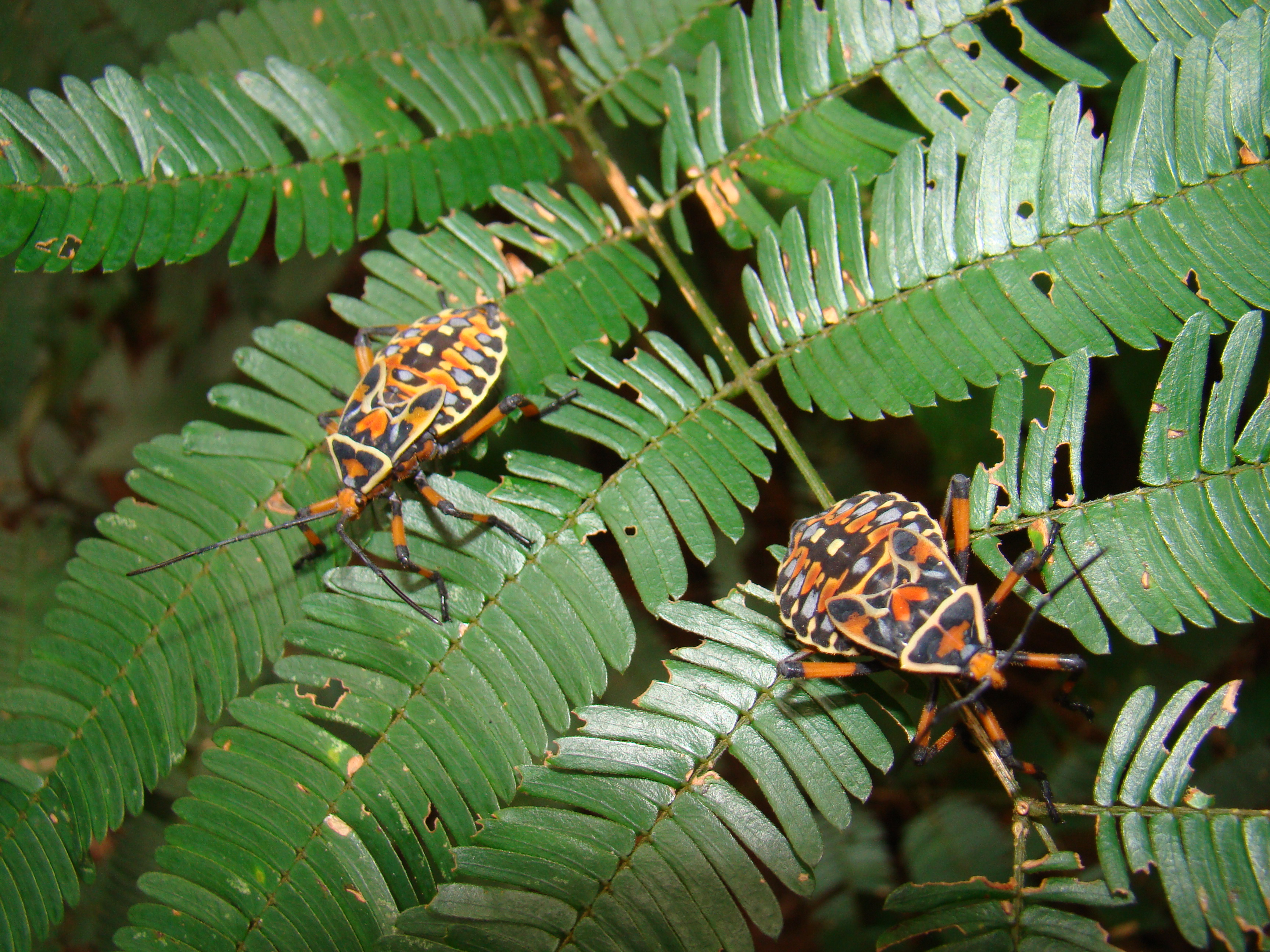 Percevejo-hector (Pachylis hector)